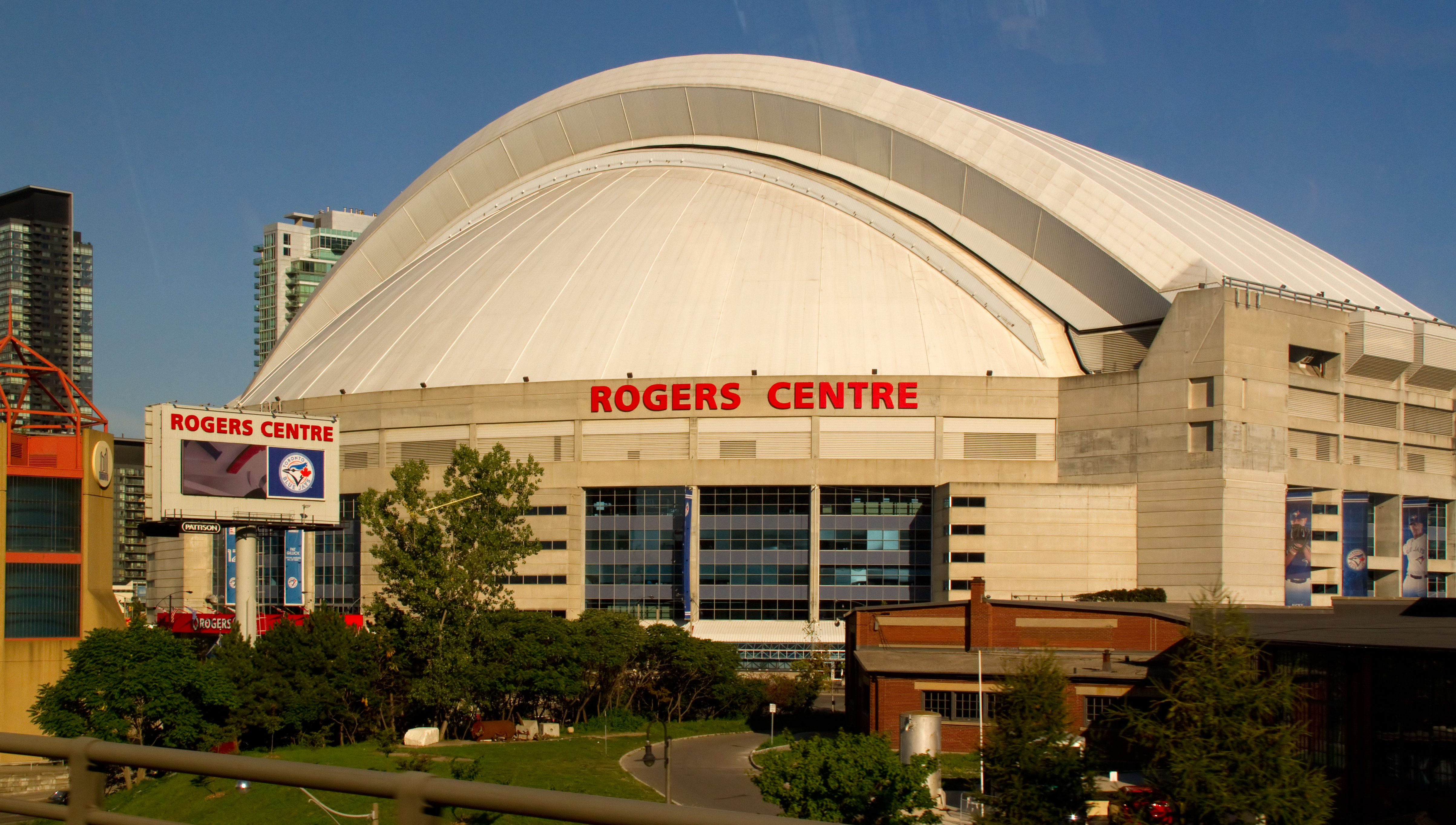 Rogers Centre